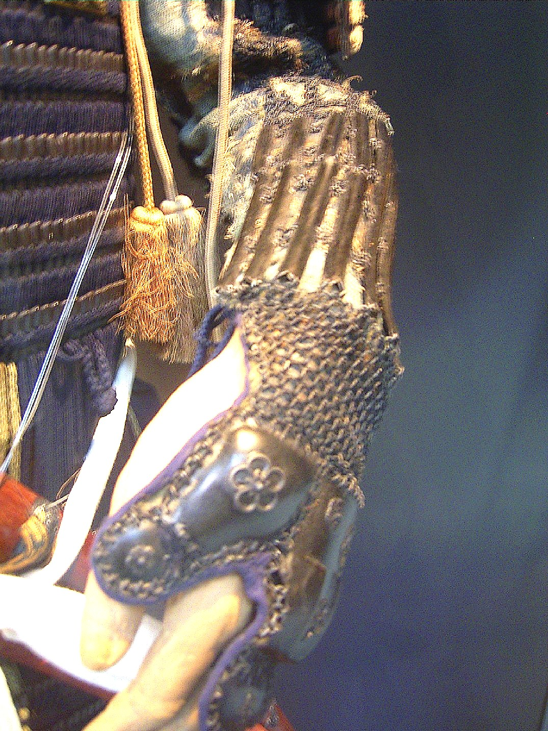 Armschutz einer leichten japanischen Infanterierüstung aus dem frühen 19. Jahrhundert.